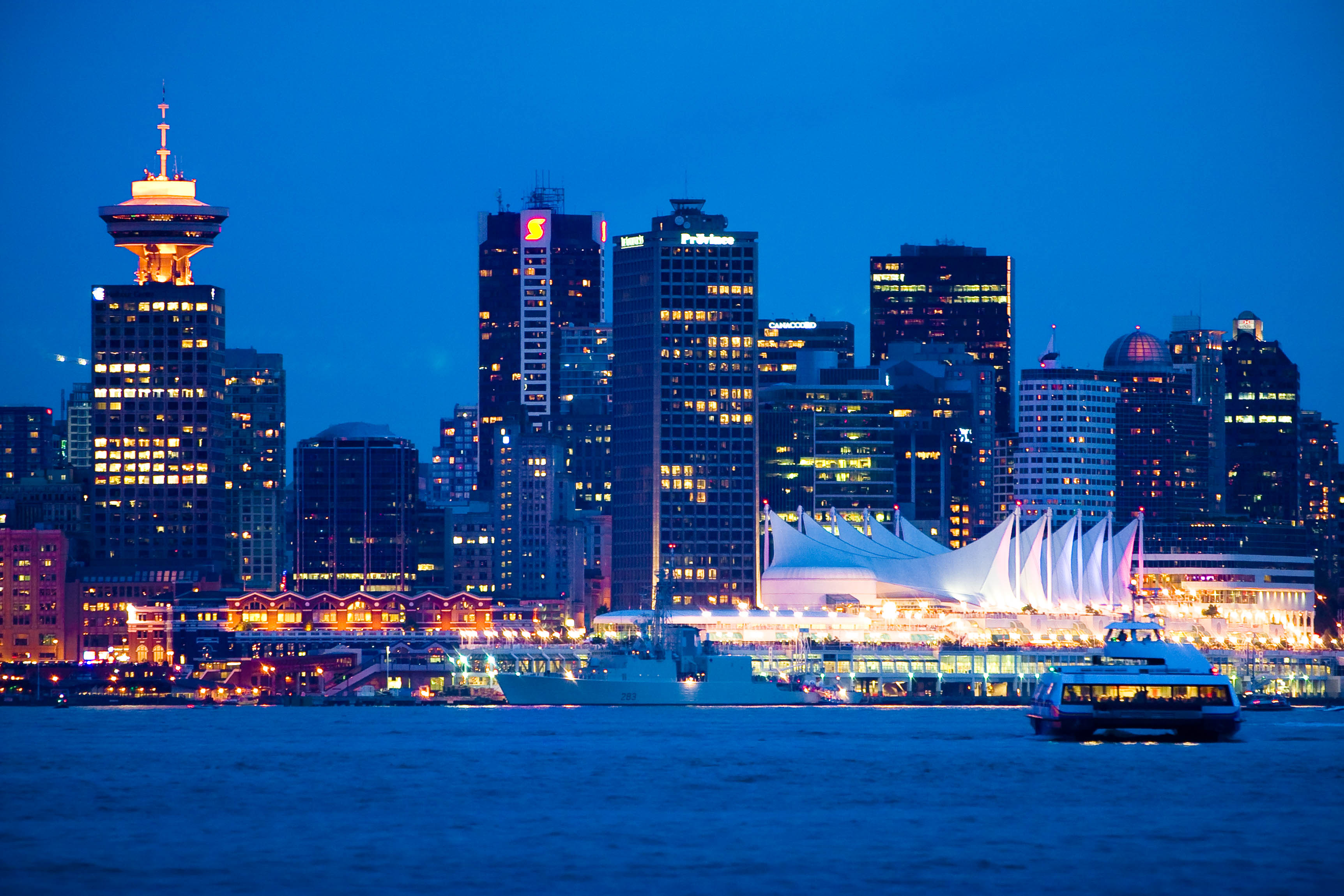 A look downtown